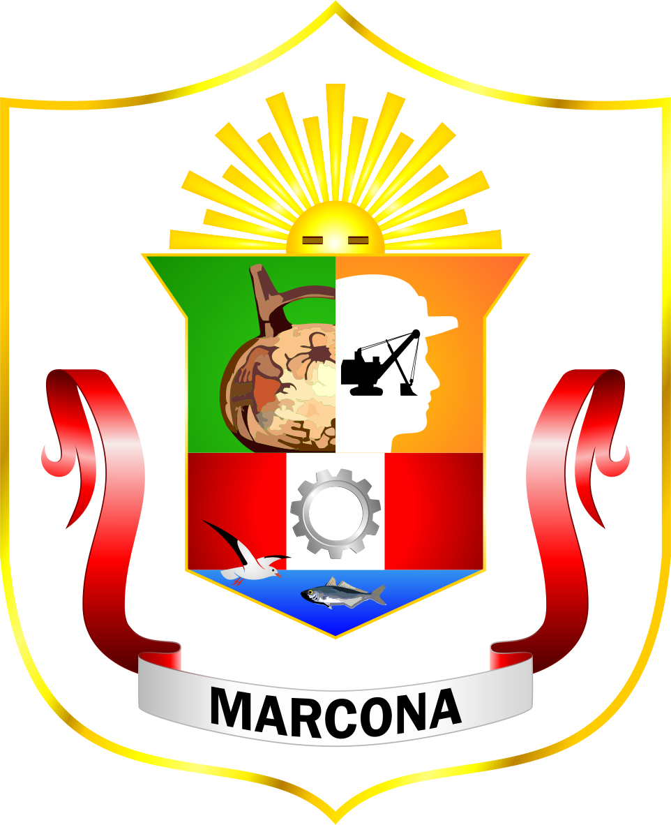 Distrito de Marcona - Provincia de Nazca - Región Ica